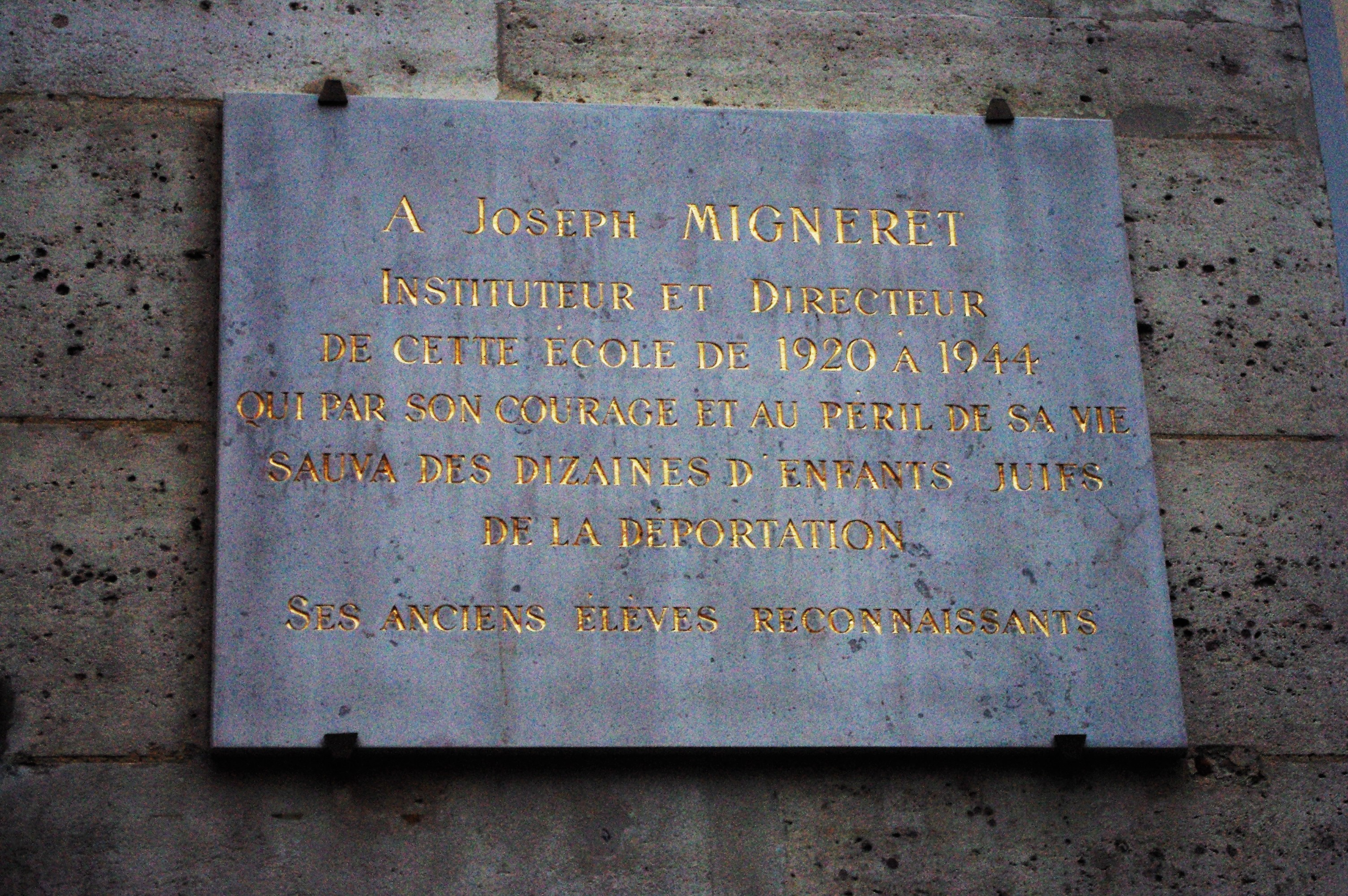 Plaque en l'honneur de Joseph Migneret sur l'école de la rue des Hospitalières Saint-Gervais